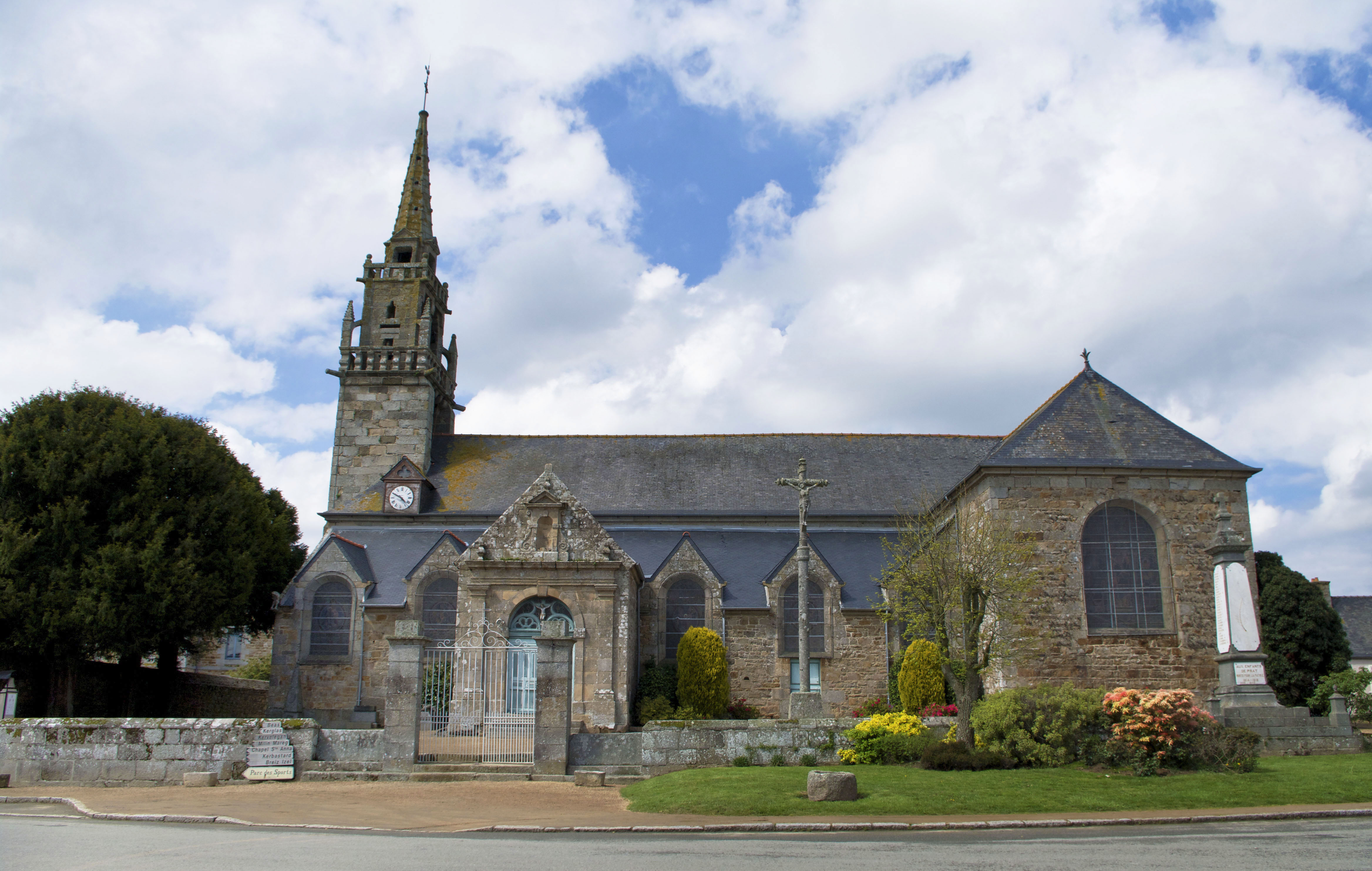 Église Saint-Pierre de Prat, Côtes d'Armor, France